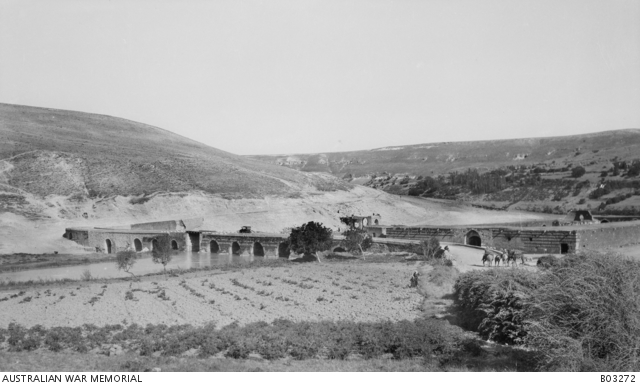 הגשר על נהר האורונטס בקרבת העיירה אר-רסטאן. הגשר תוקן לאחר שחובל על ידי הטורקים